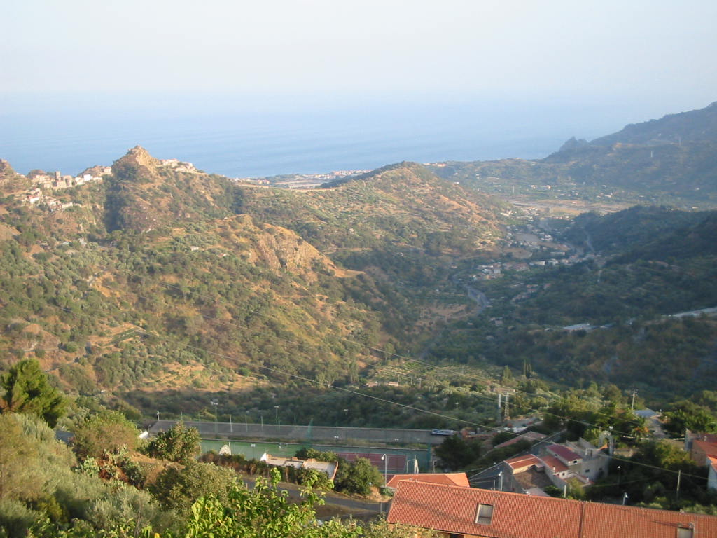 Uno dei panorami da Casalvecchio